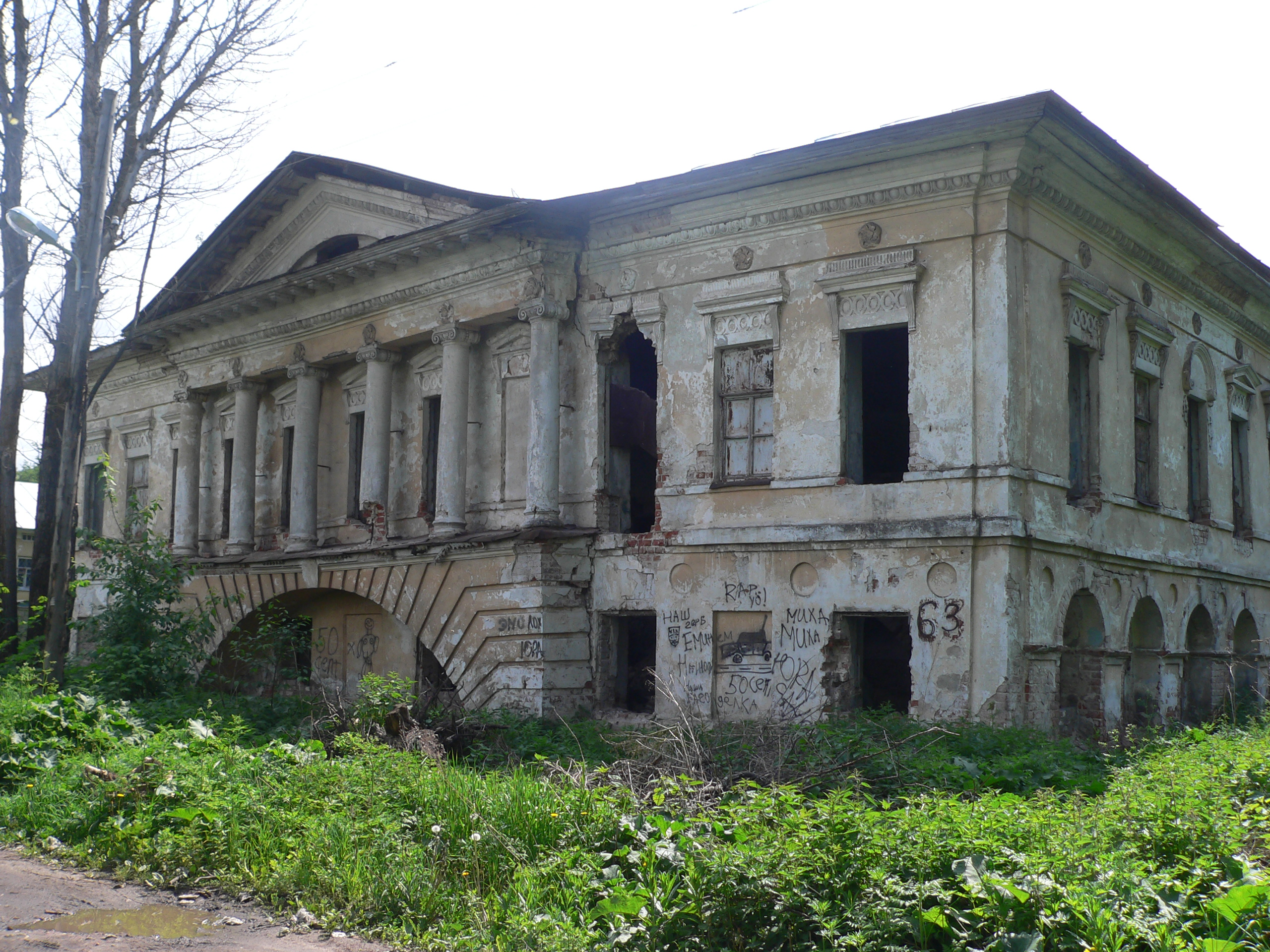 Skulyabin Alms House in Vologda. 2008.